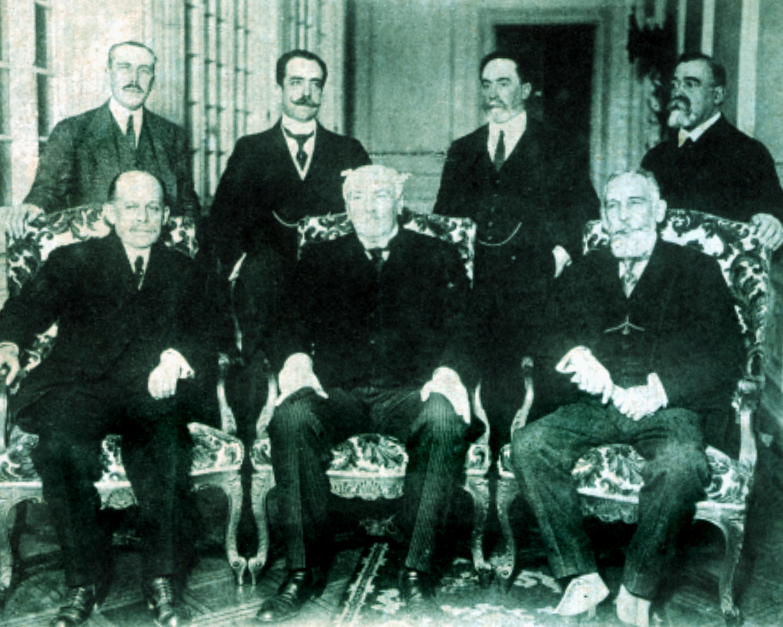 Juan Luis Sanfuentes. Presidente de Chile (1915-1920). Fotografía junto a sus Ministros de Estado. 12 de octubre de 1917.